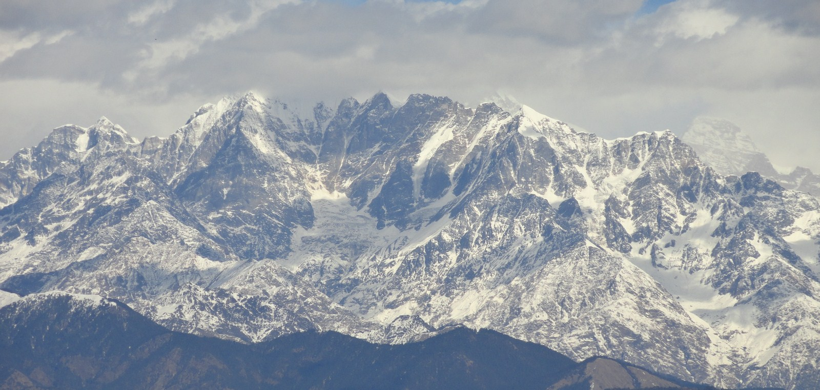 Bageshwar, Uttarakhand, India